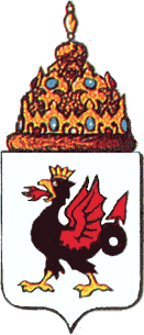 Герб царства Казанского